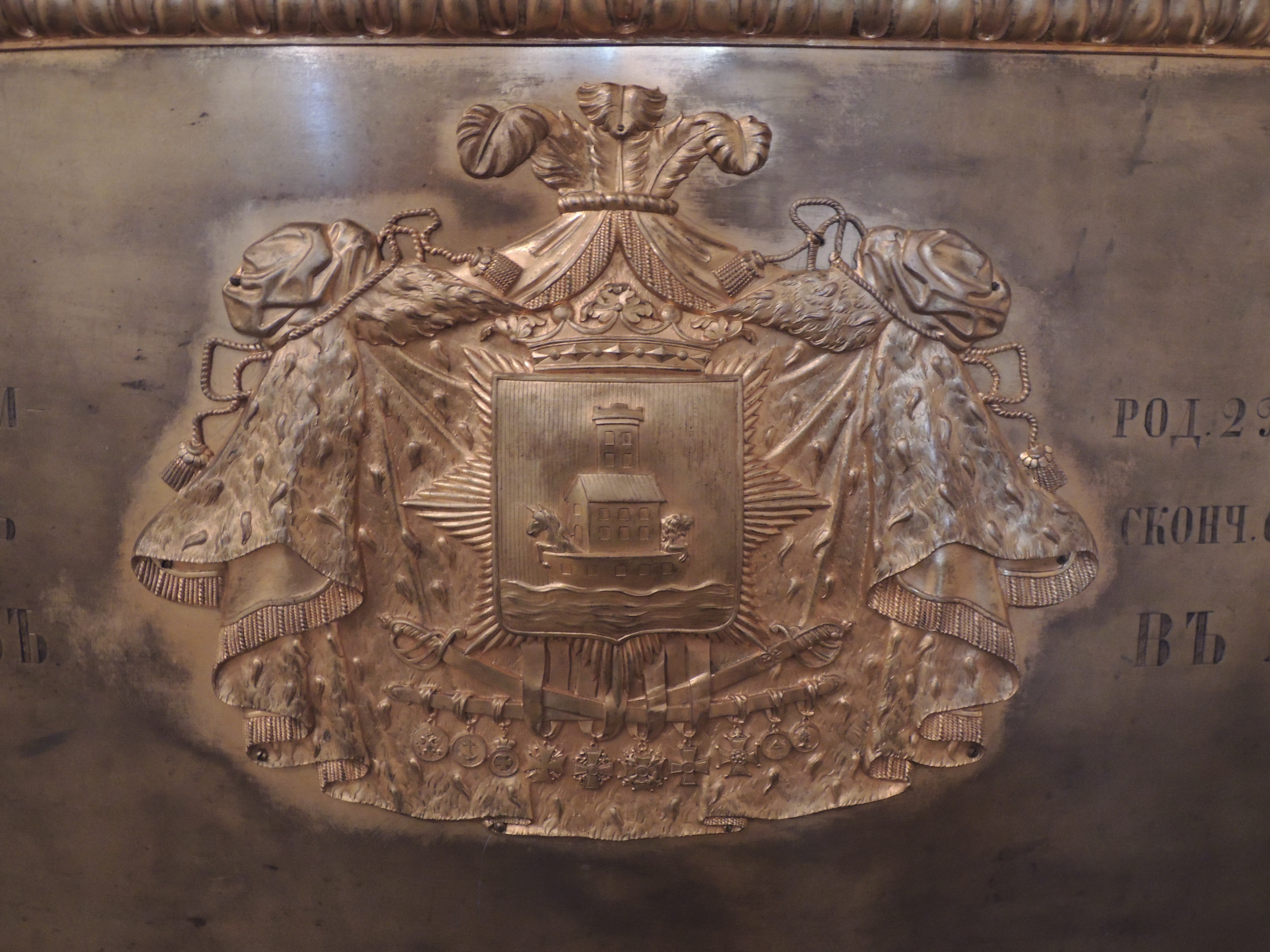 Благовещенская церковь Александро-Невской лавры. Чертков, Иван Дмитриевич (1797—1865). Пристенный бронзовый памятник. Перенесен из Духовской церкви.